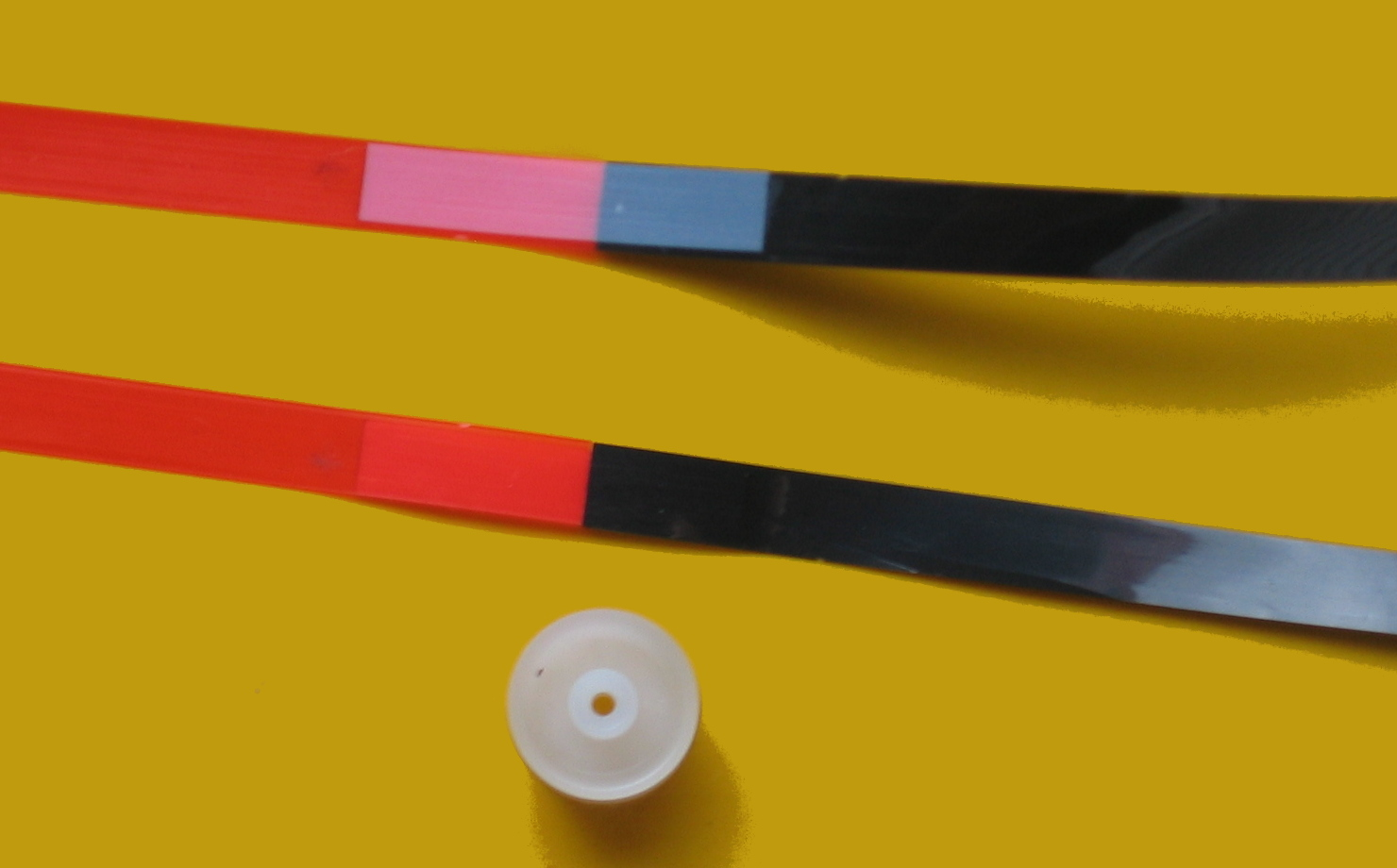 Vorband mit Klebestelle einer Compact Cassette